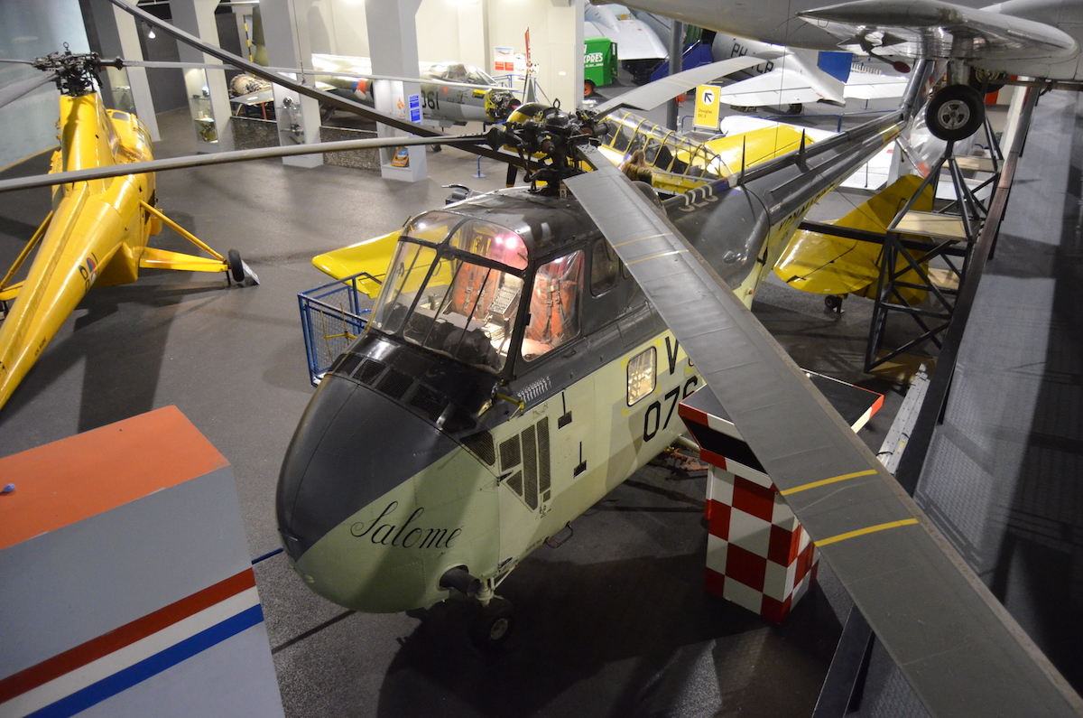 Aviodrome Lelystad. Sikorsky S55, 076 'Salome'. Foto: Erik Swierstra.